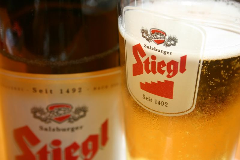 Stiegl beer